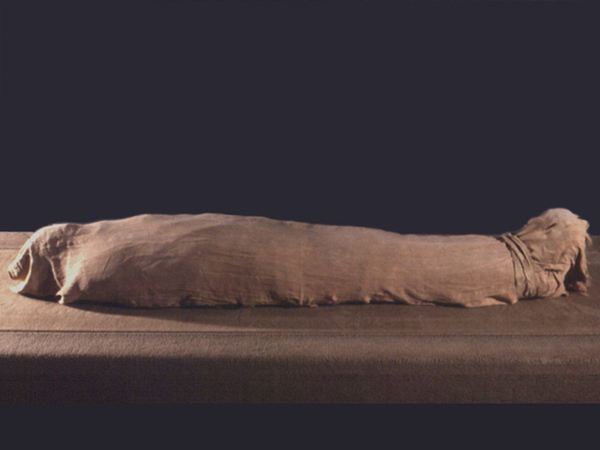 Sarcófago de Bak- Momia (Monarquía Ptolemaica). Número de inventario: 15208BIS.